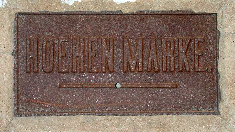 Österreichische Höhenmarke am alten Bahnhof von Tarvis/Tarvisio